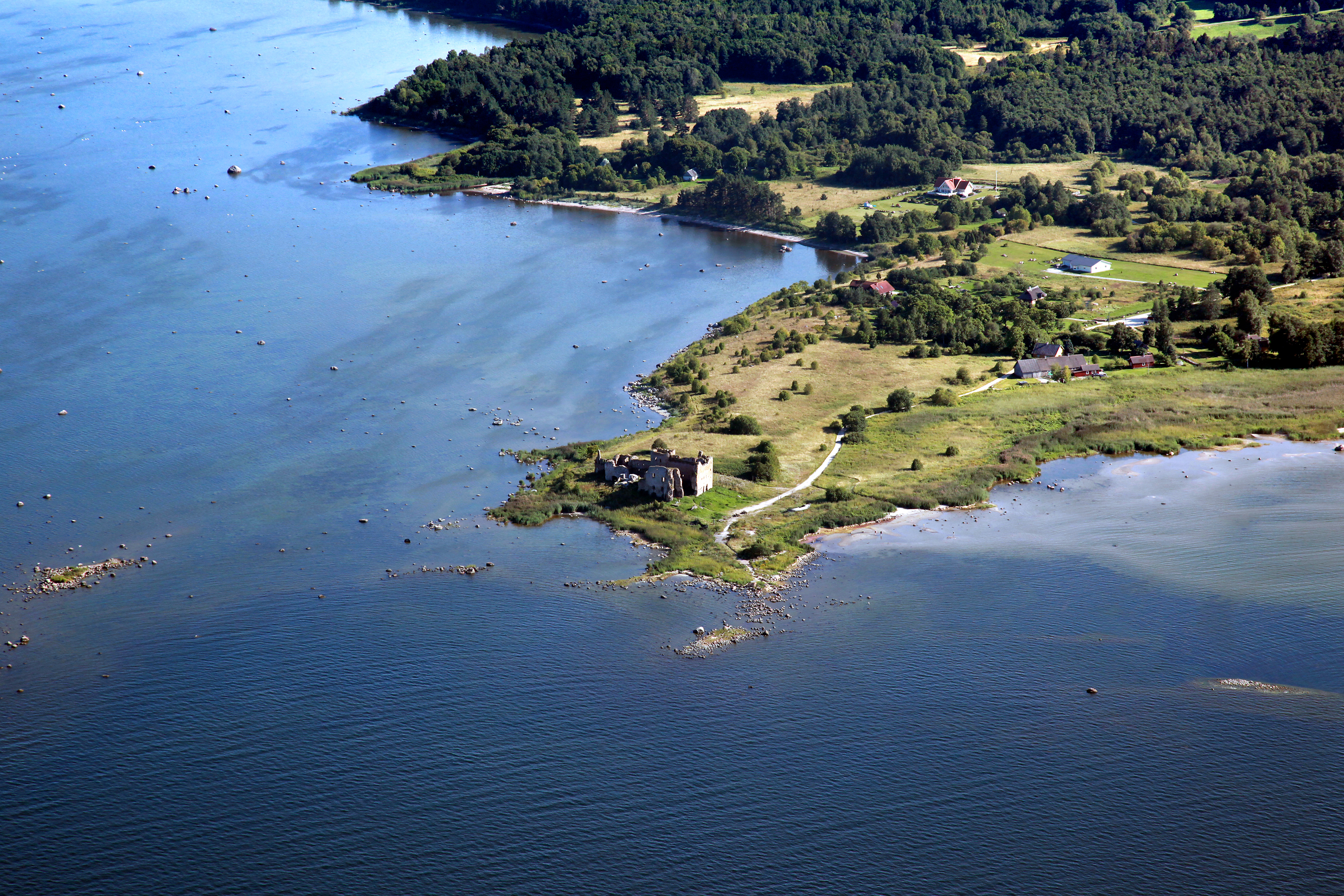 Toolse